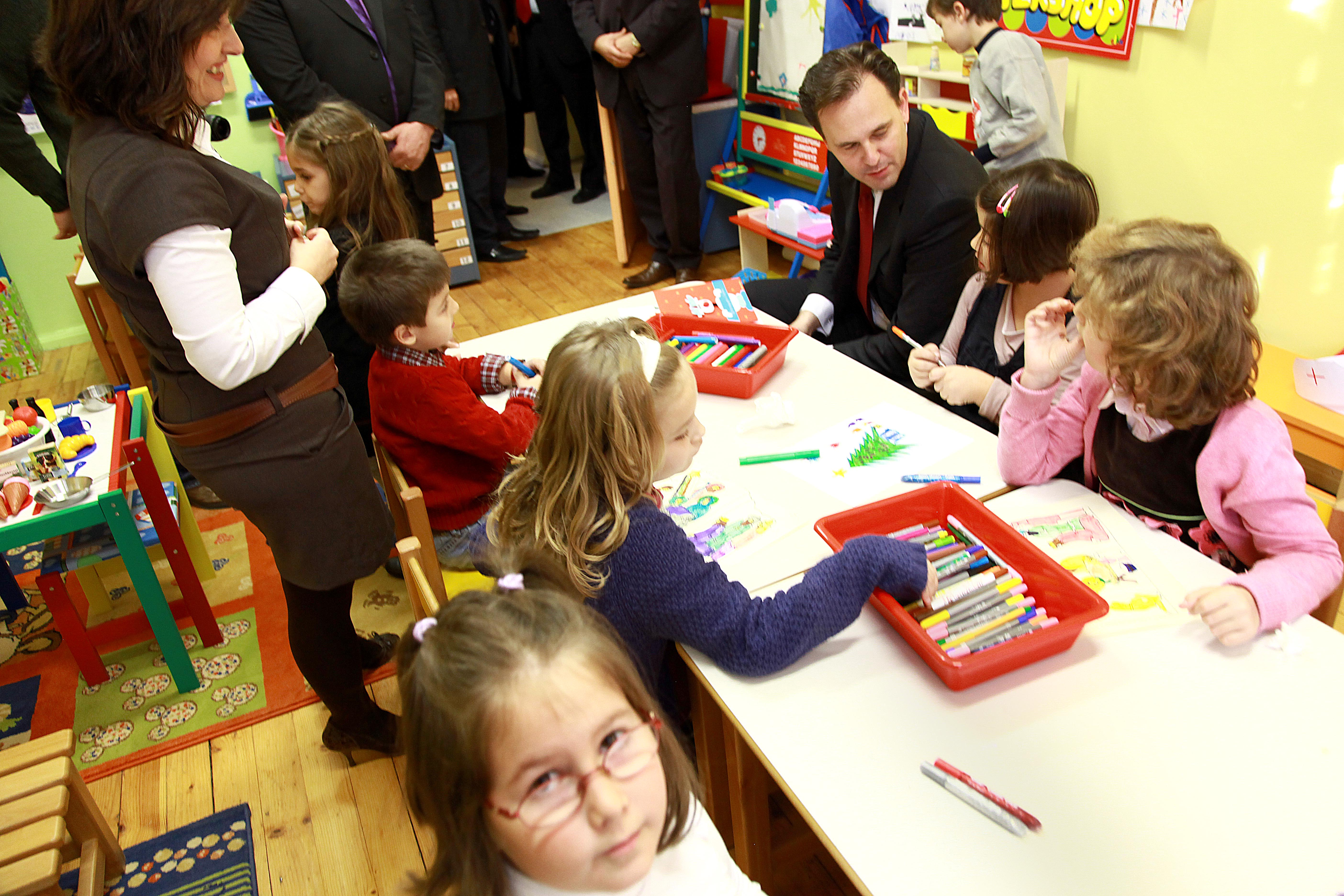 Κατά τη διάρκεια της παραμονής του στη Σόφια (11.12.2010), ο Υπουργός Εξωτερικών κ. Δ. Δρούτσας επισκέφθηκε τον Ελληνικό Μορφωτικό Σύλλογο Σόφιας "Οδυσσέας Ελύτης" των τμημάτων μητρικής γλώσσας και πολιτισμού που λειτουργούν υπό την αιγίδα του ελληνικού Υπουργείου Παιδείας, Δια Βίου Μάθησης και Θρησκευμάτων.